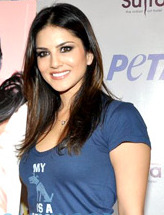 Sunny Leone launches PETA - Adopt a stray dog campaign